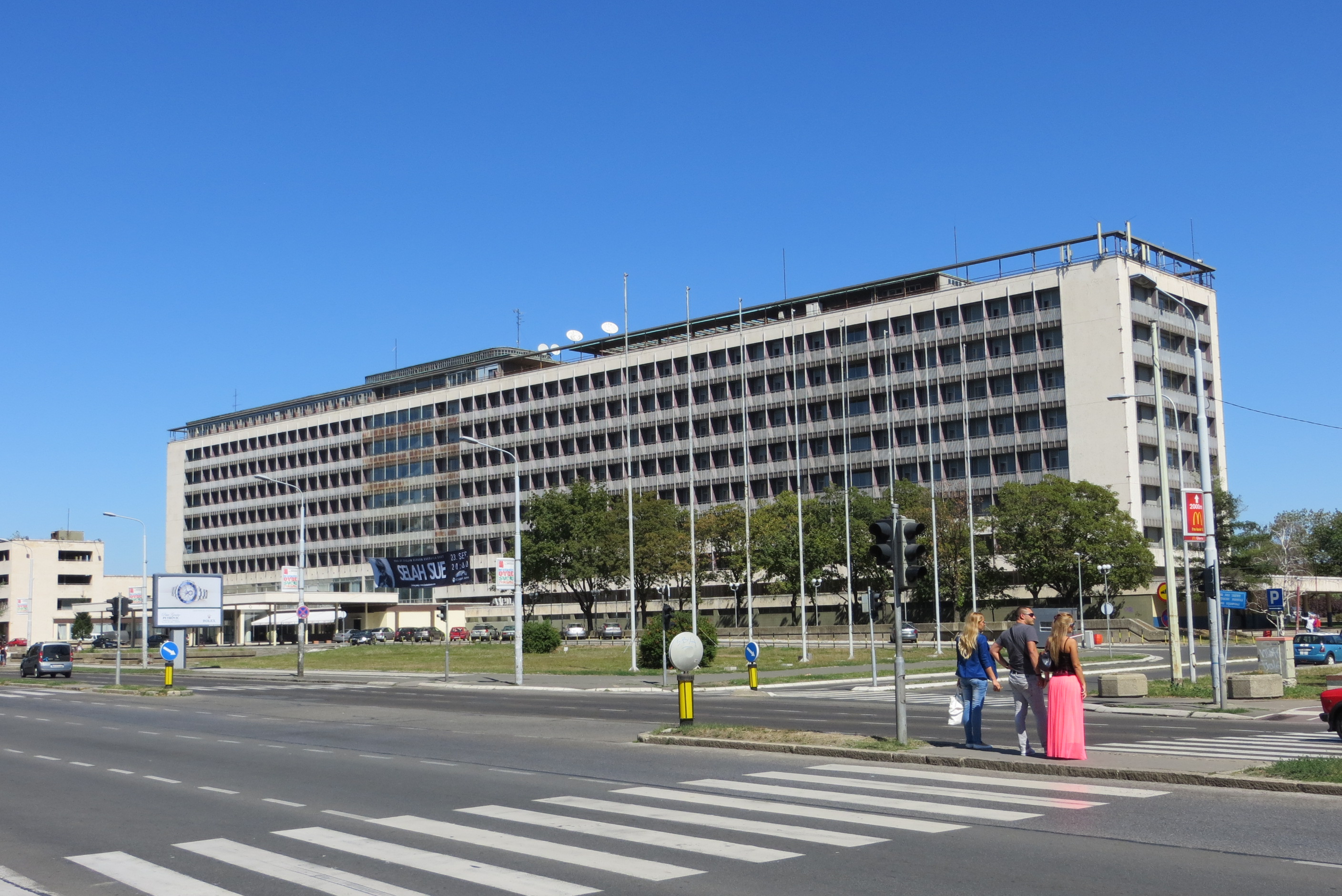 Hotel Jugoslavija